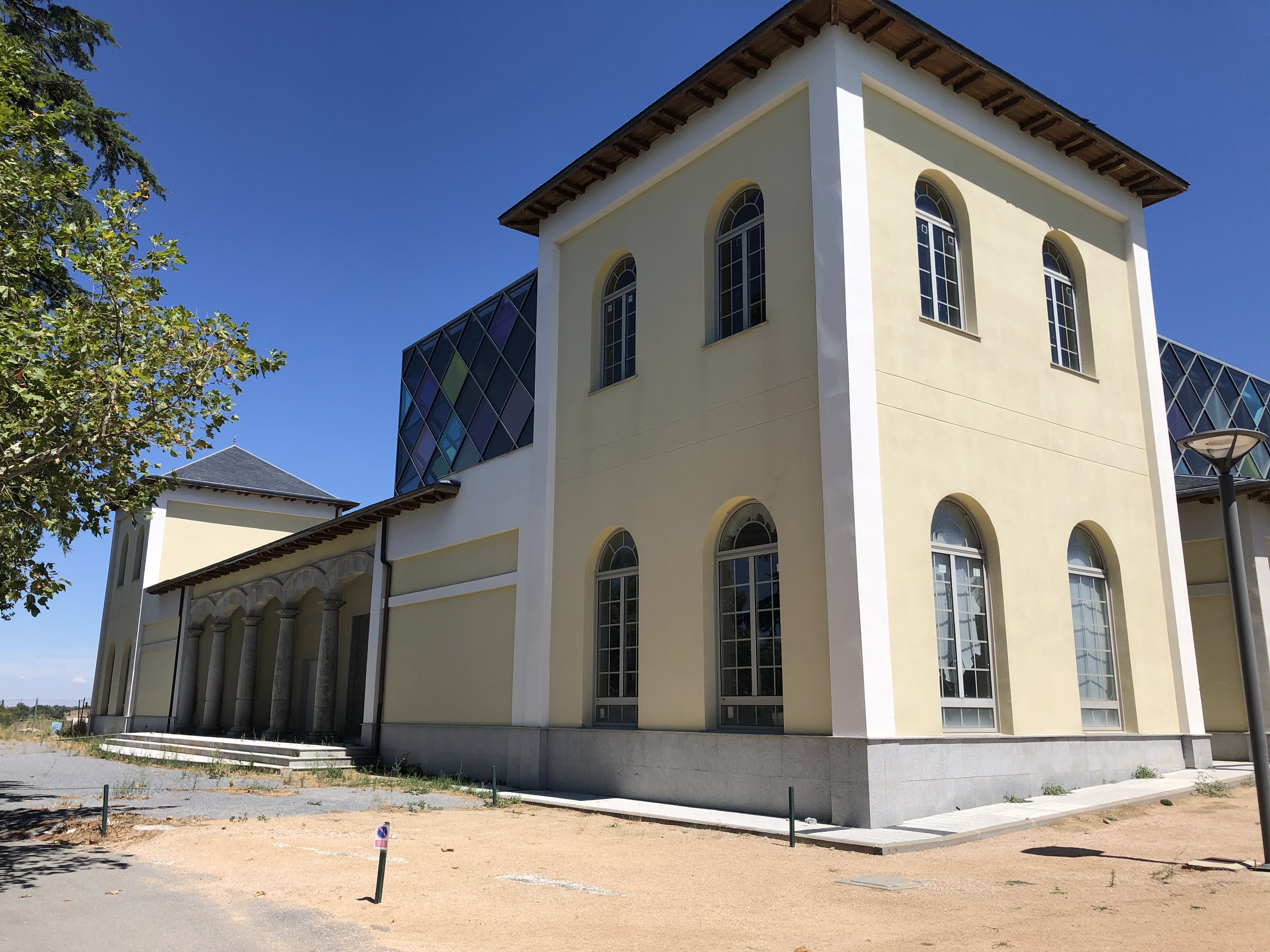 Vista de la fachada oeste del edificio de la Faisanera parte de la antigua Real Quinta de Quitapesares